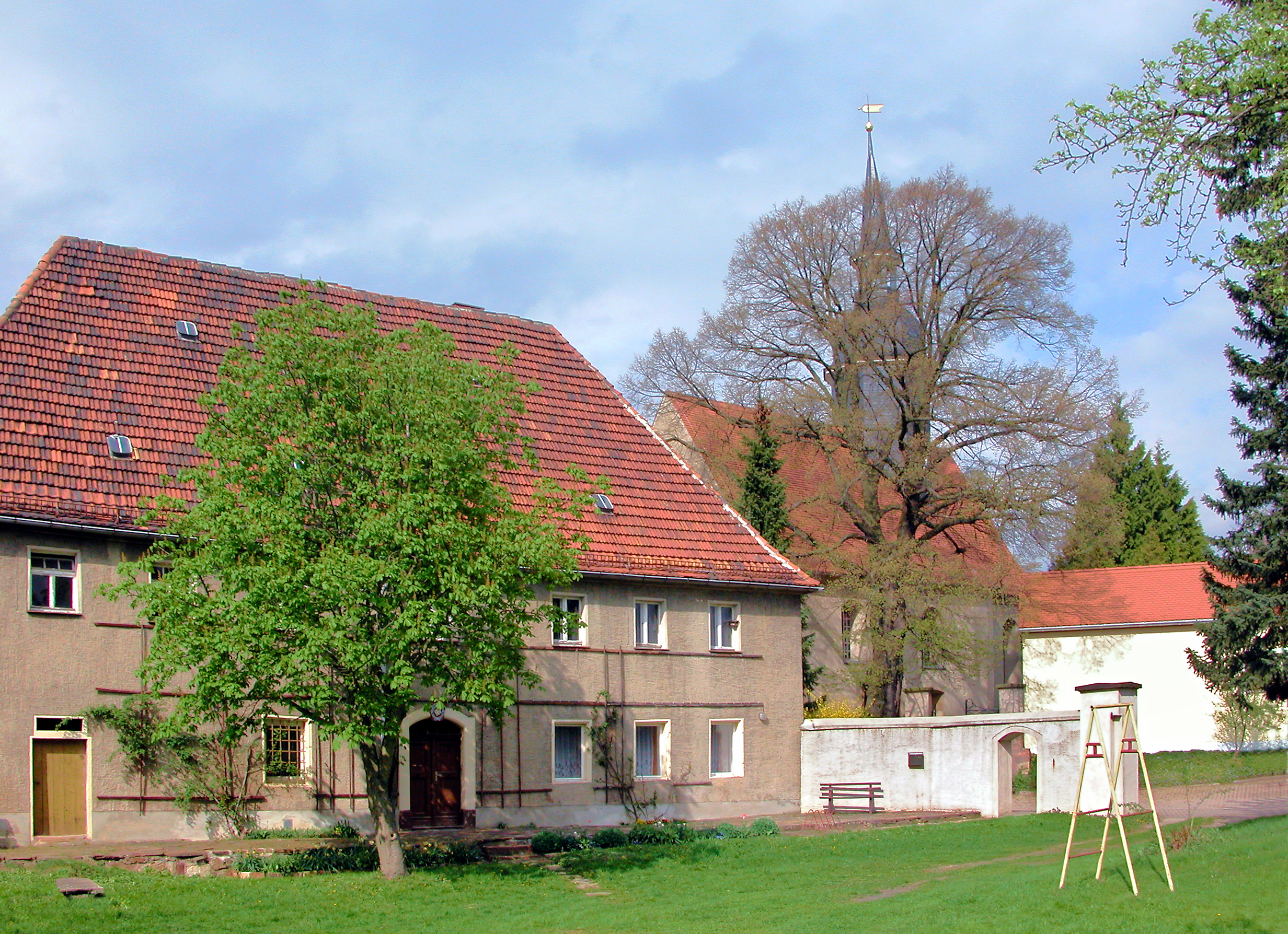 27.04.2010 4769 Ablaß (Sornzig-Ablaß), Kirchberg 1: Pfarrhaus (GMP: 51.225883,12.947456), dahinter die Dorfkirche (ab 13. Jh.). [DSCN41777.TIF]20100427400DR.JPG(c)Blobelt